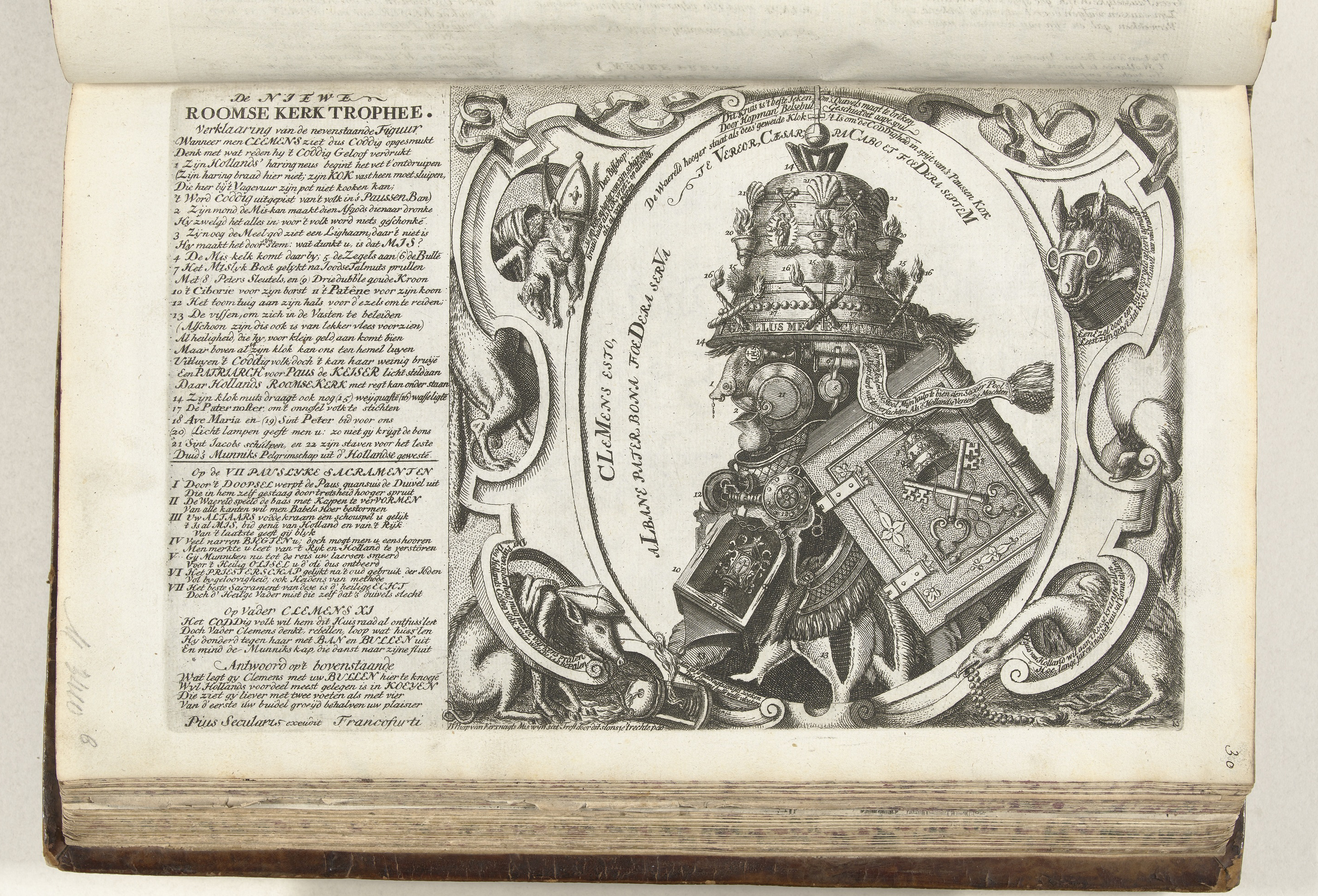 Spotprent op paus Clemens XI, 1705, naar Tobias Stimmer